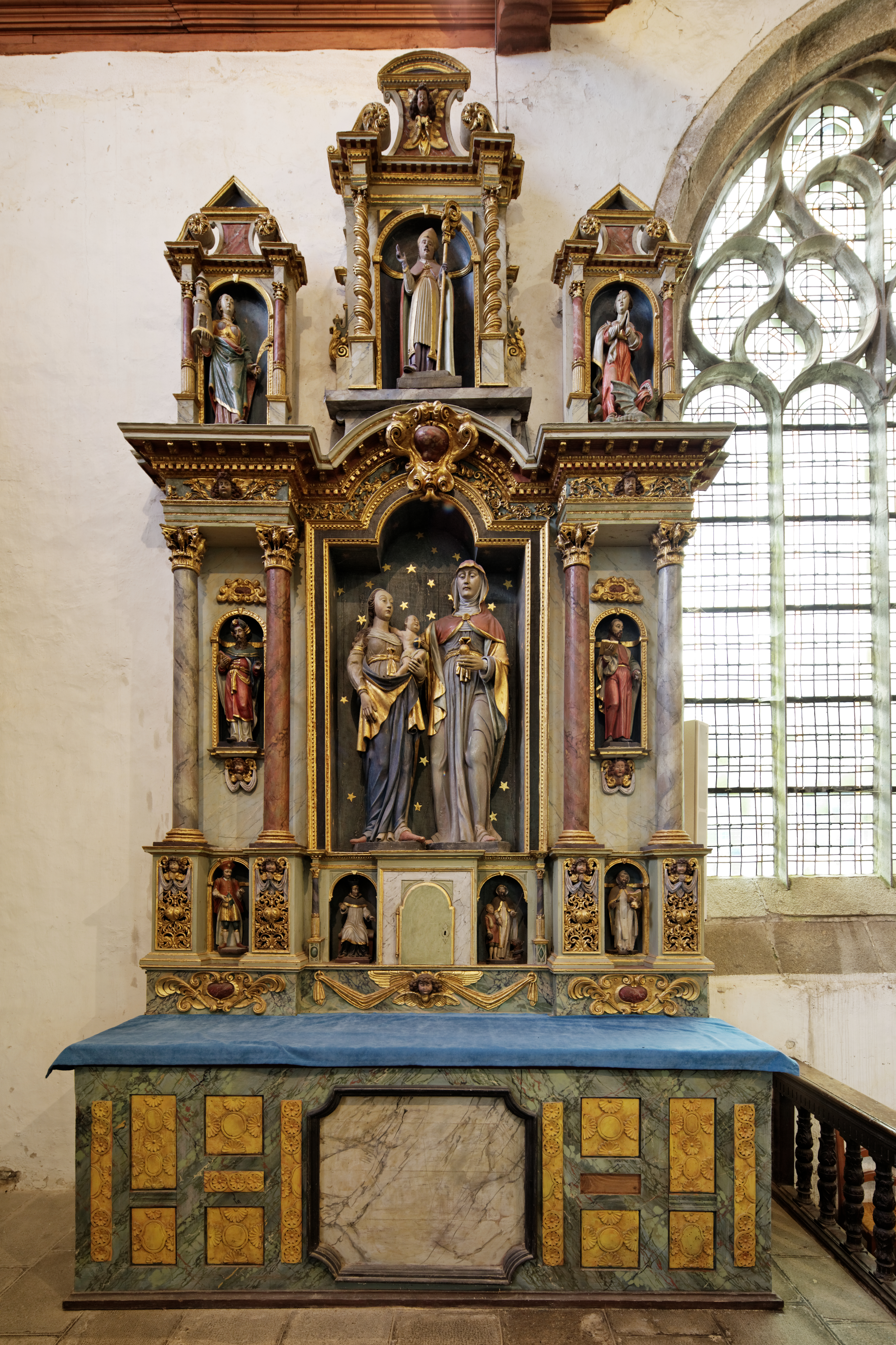 Retable de Sainte-Anne de l'église Notre-Dame de l'enclos paroissial de Lampaul-Guimiliau dans le Finistère.